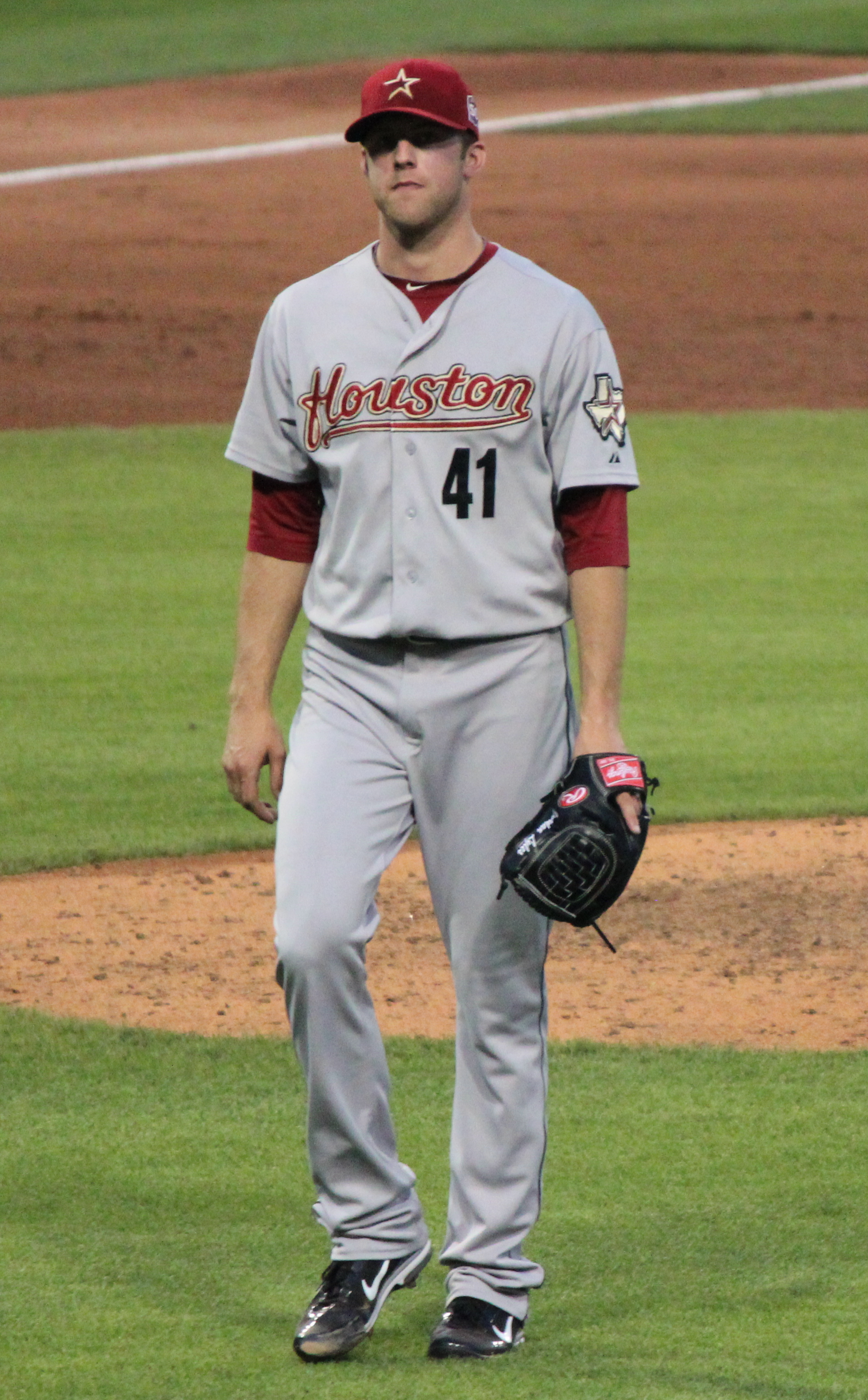 Jordan Lyles